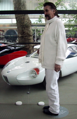 Luigi Colani, auf seiner Ausstellung "Das Gesamtwerk" in Karlsruhe.